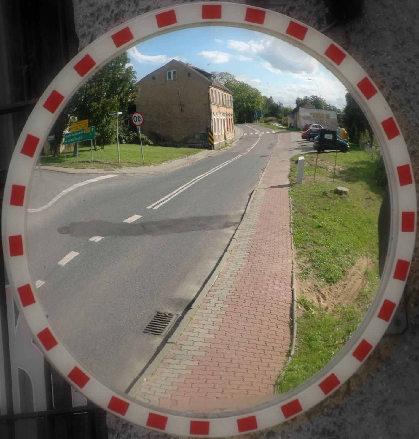 Droga wojewódzka nr 106 w Golczewie. Kierunek Kamień Pomorski. Widok odbity w lustrze.